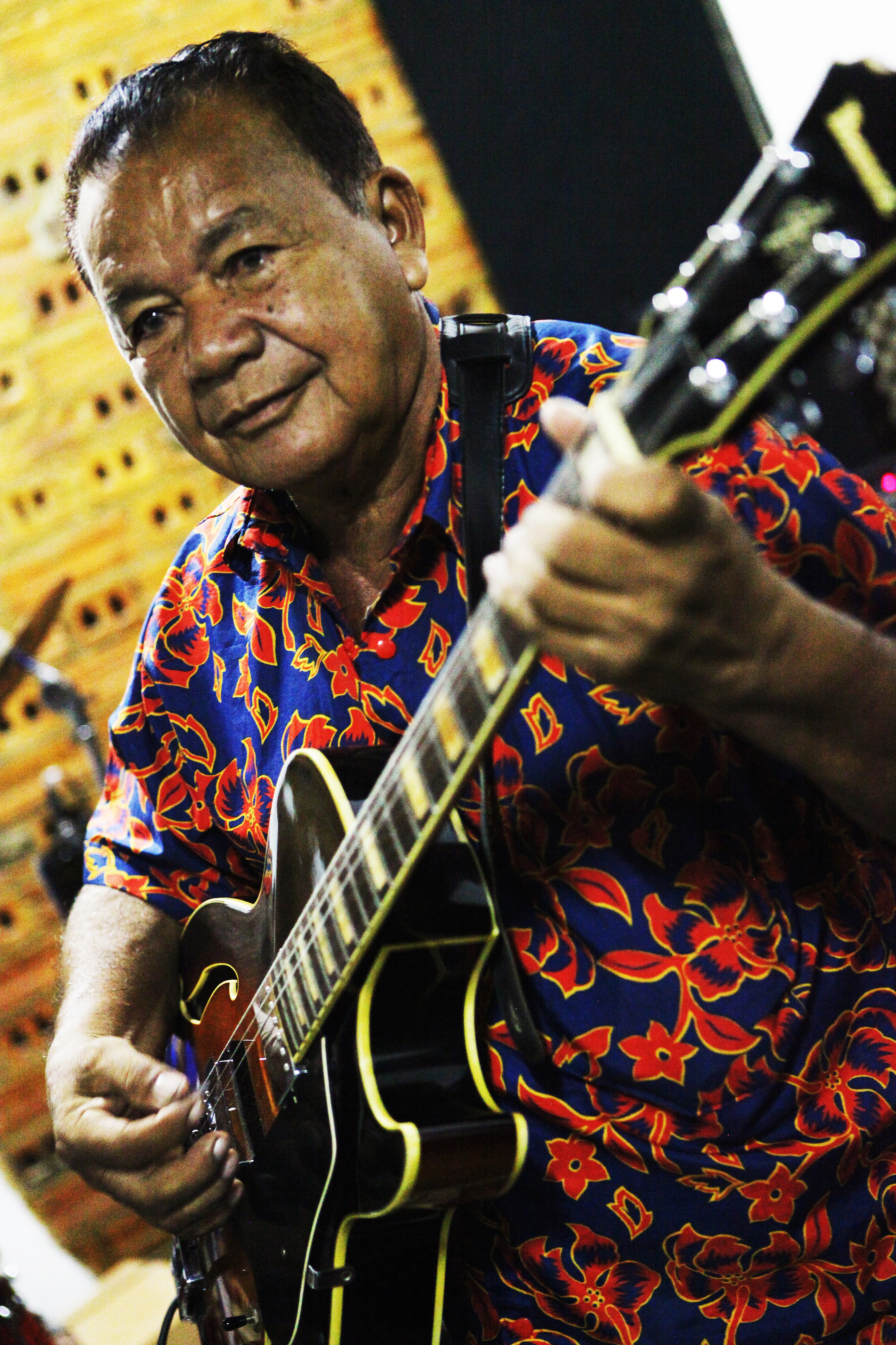 Mestre Vieira em Belém do Pará